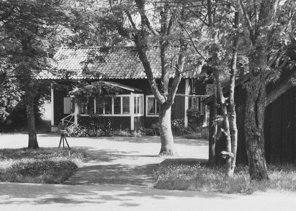 Larsbodatorpet